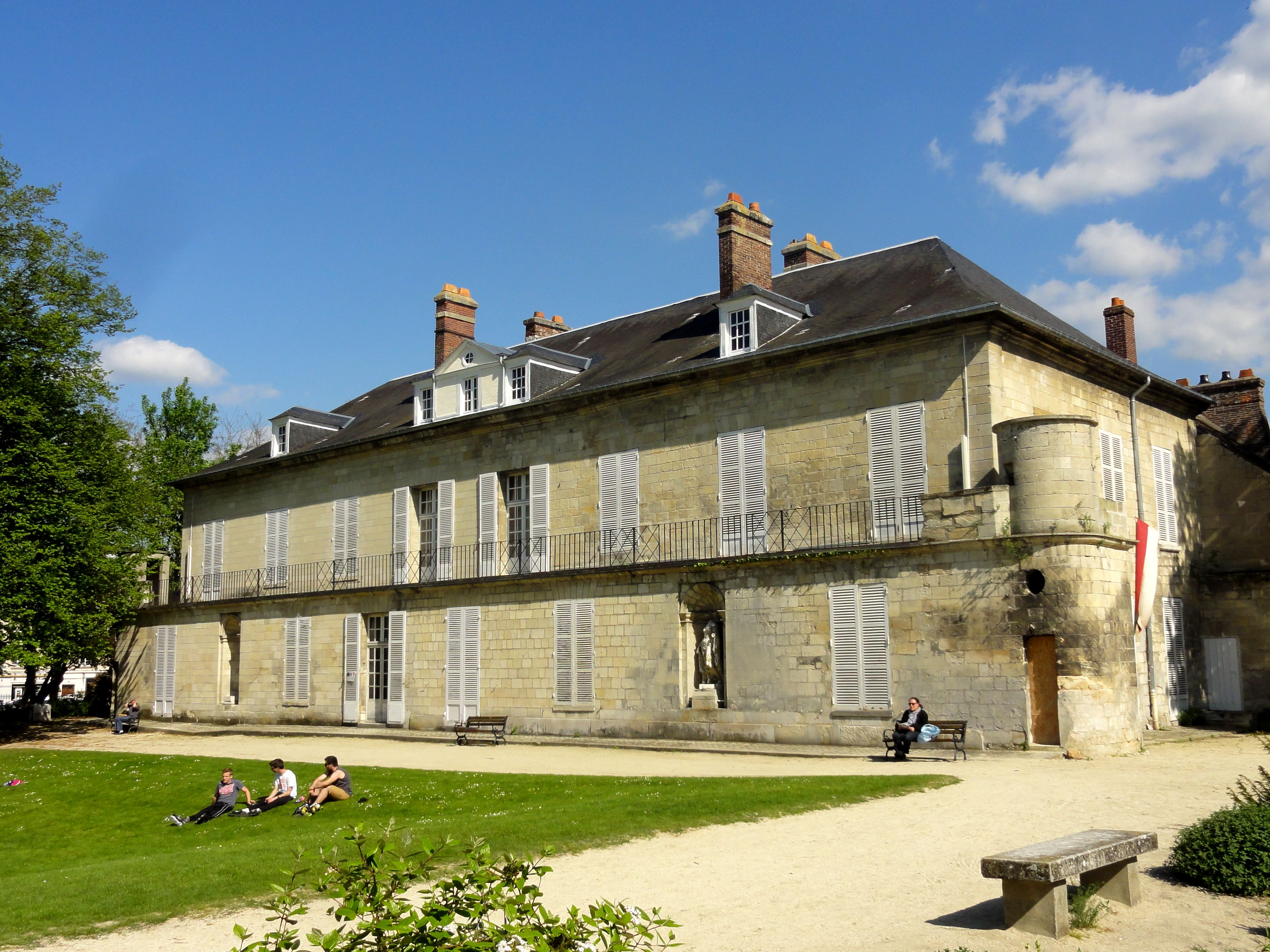 Hôtel de Songeons-Bicquilley - musée Antoine-Vivenel, façade sur le parc de Songeons côté Oise.